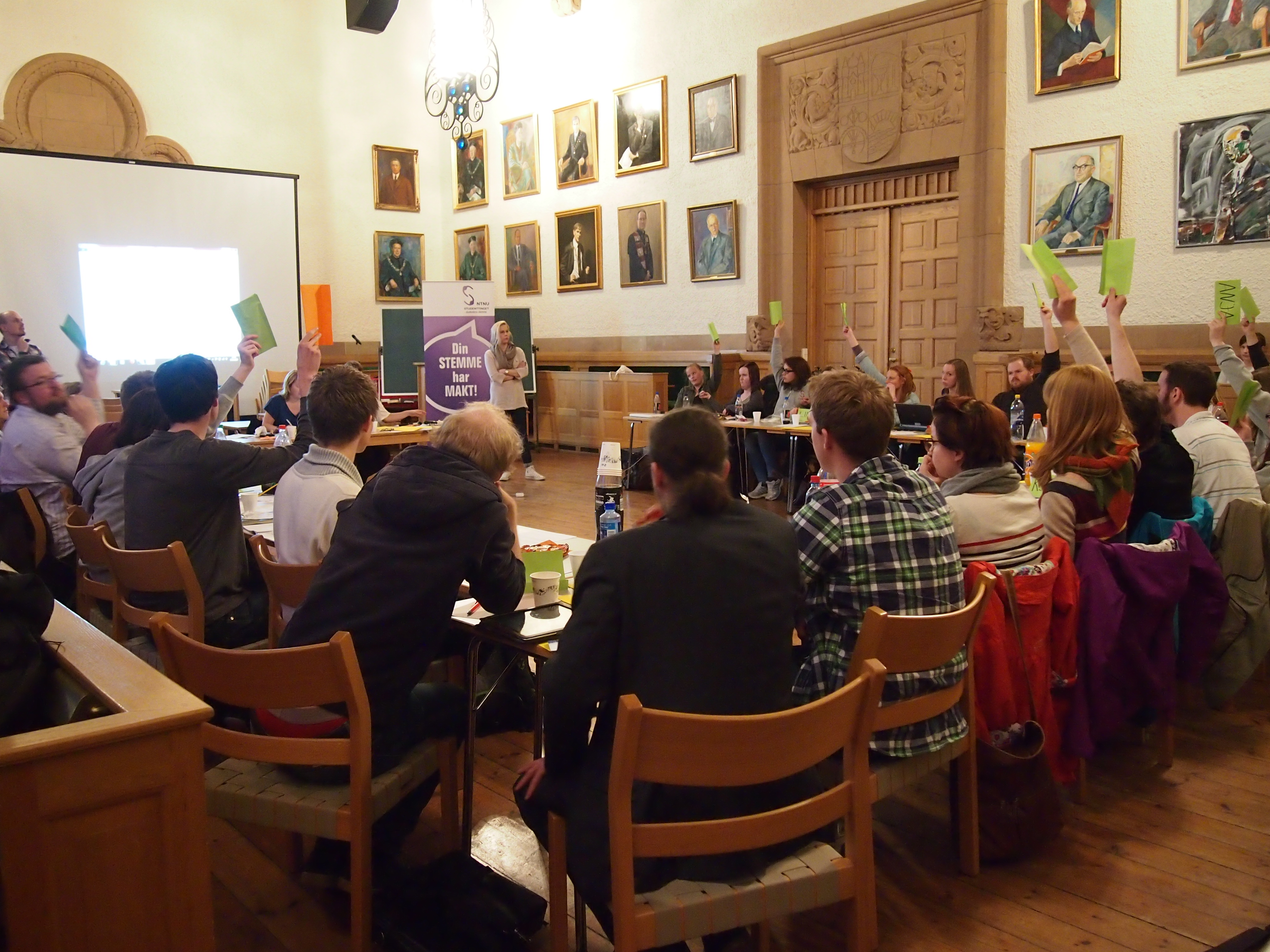 Møte i Studenttinget.